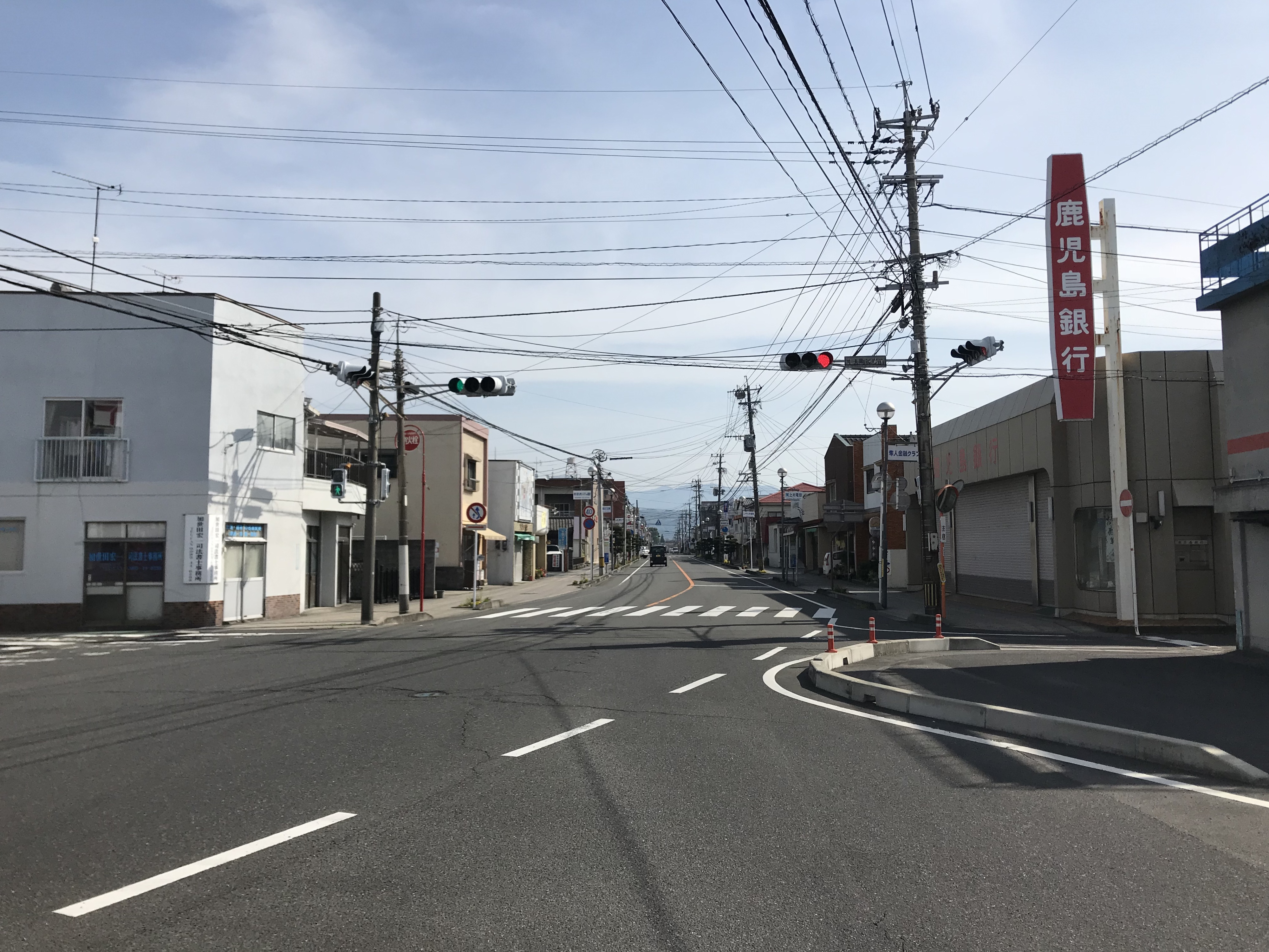 隼人駅付近の鹿児島県道473号